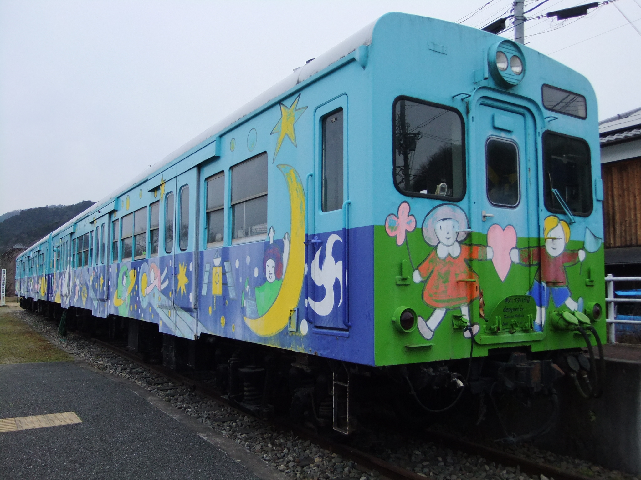 市原駅跡のキハ30 70とキハ30 72